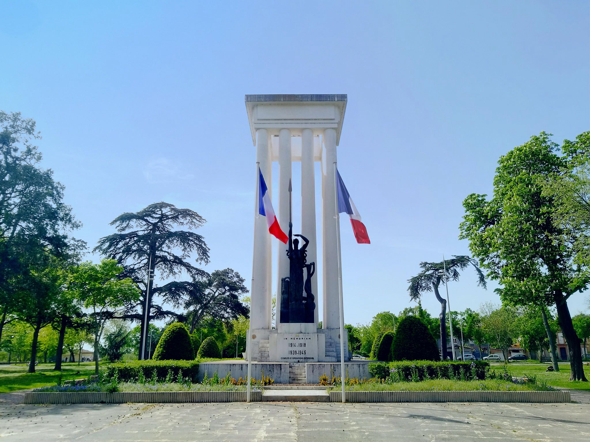 Monuments aux morts Montauban